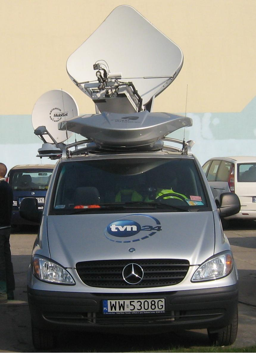 Mercedes-Benz Vito II w Kamieniu Pomorskim.